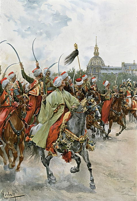 Mamelouks de la Garde impériale au défilé.